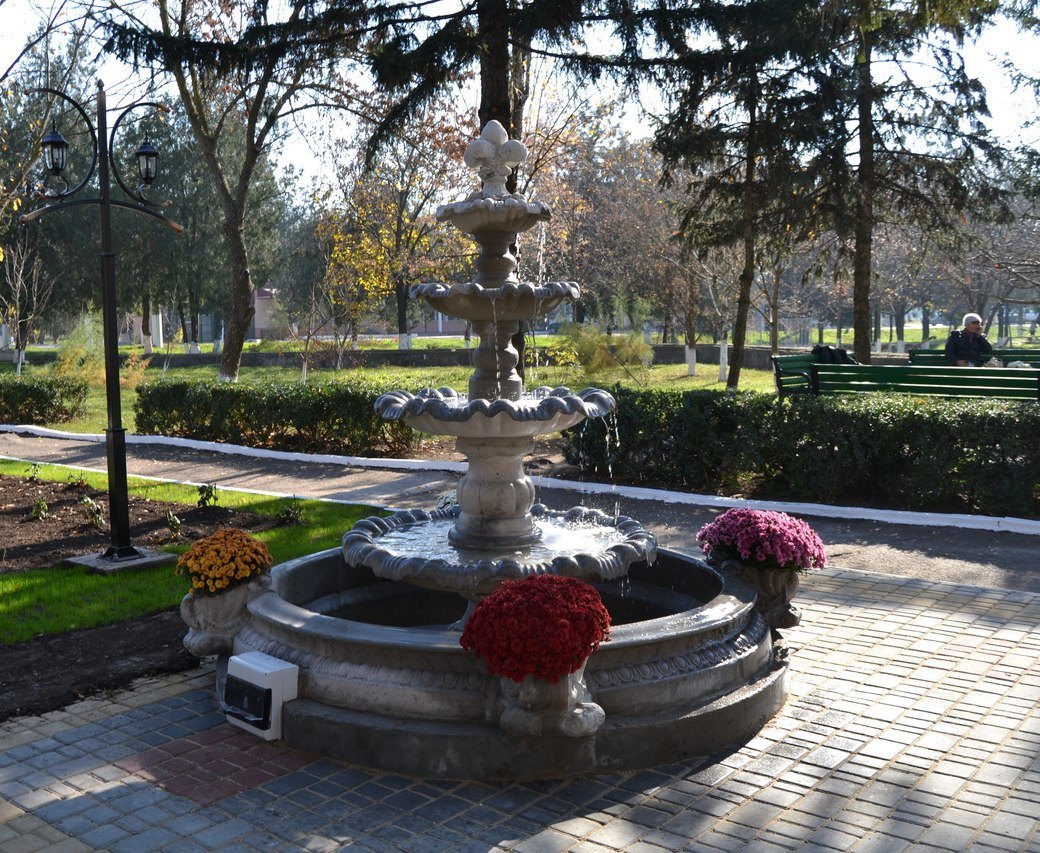 Тижневий ринок м.Березівка